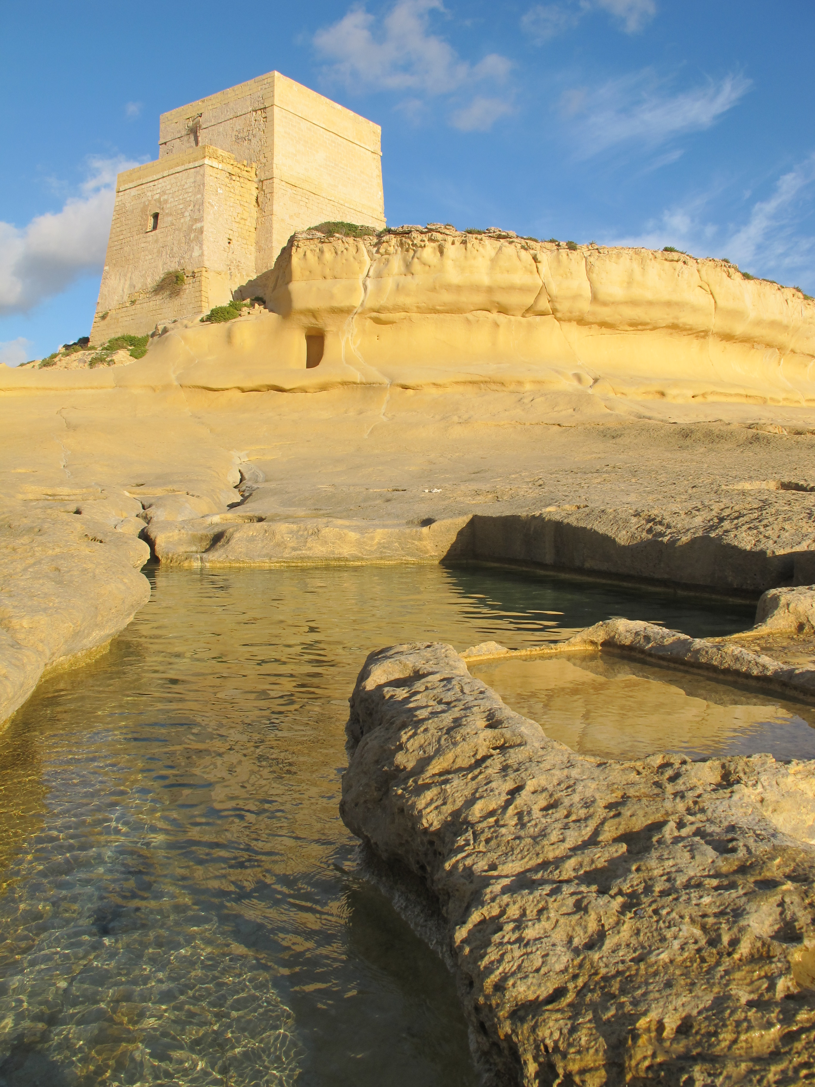 Xlendi Tower Nov 2014